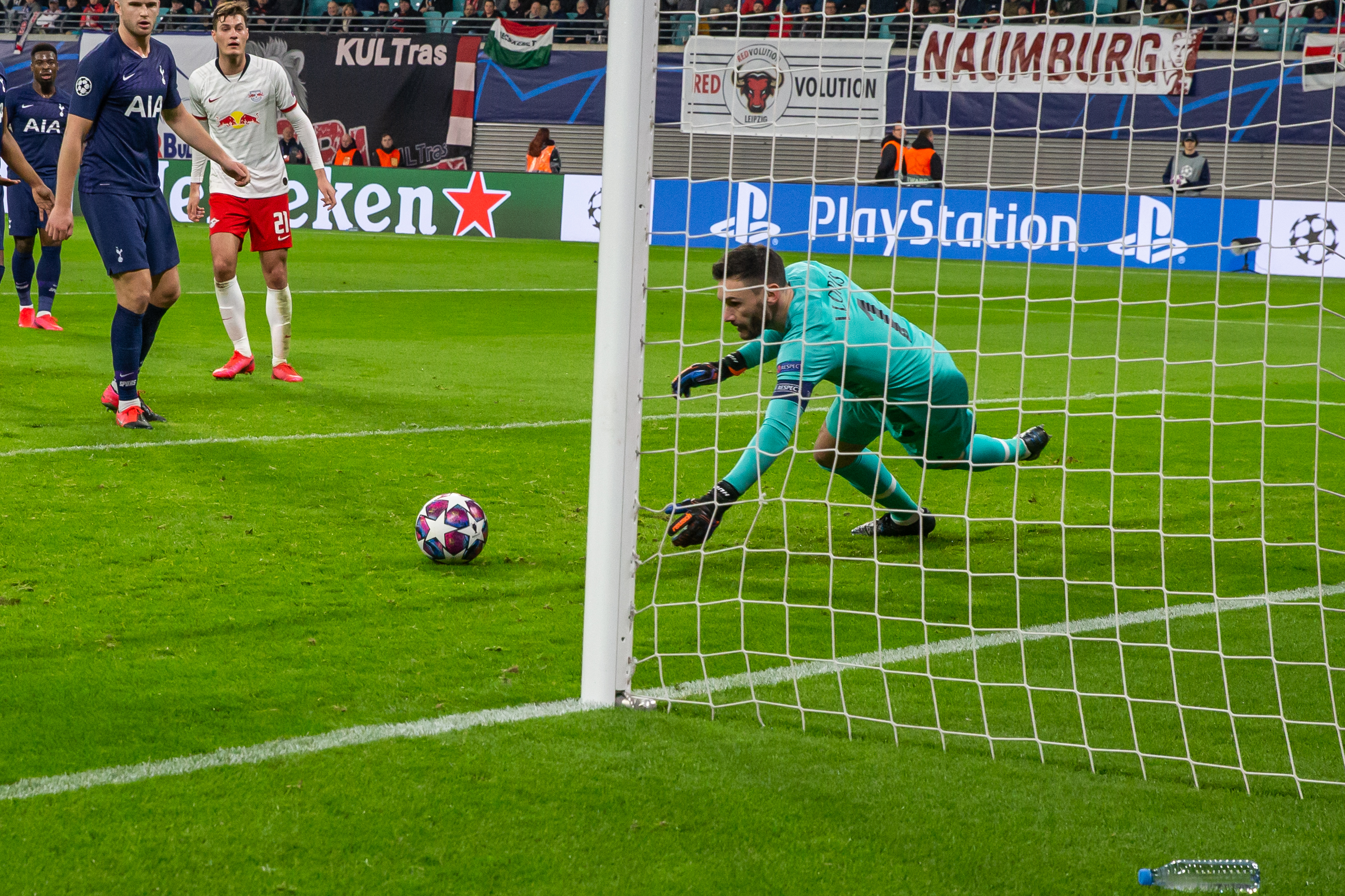 Fußball, Männer, UEFA Champions League Achtelfinale, RB Leipzig - Tottenham Hotspur; Hugo Lloris (Tottenham Hotspur, 1, Torwart, goalkeeper) hält einen Ball; Torschuss